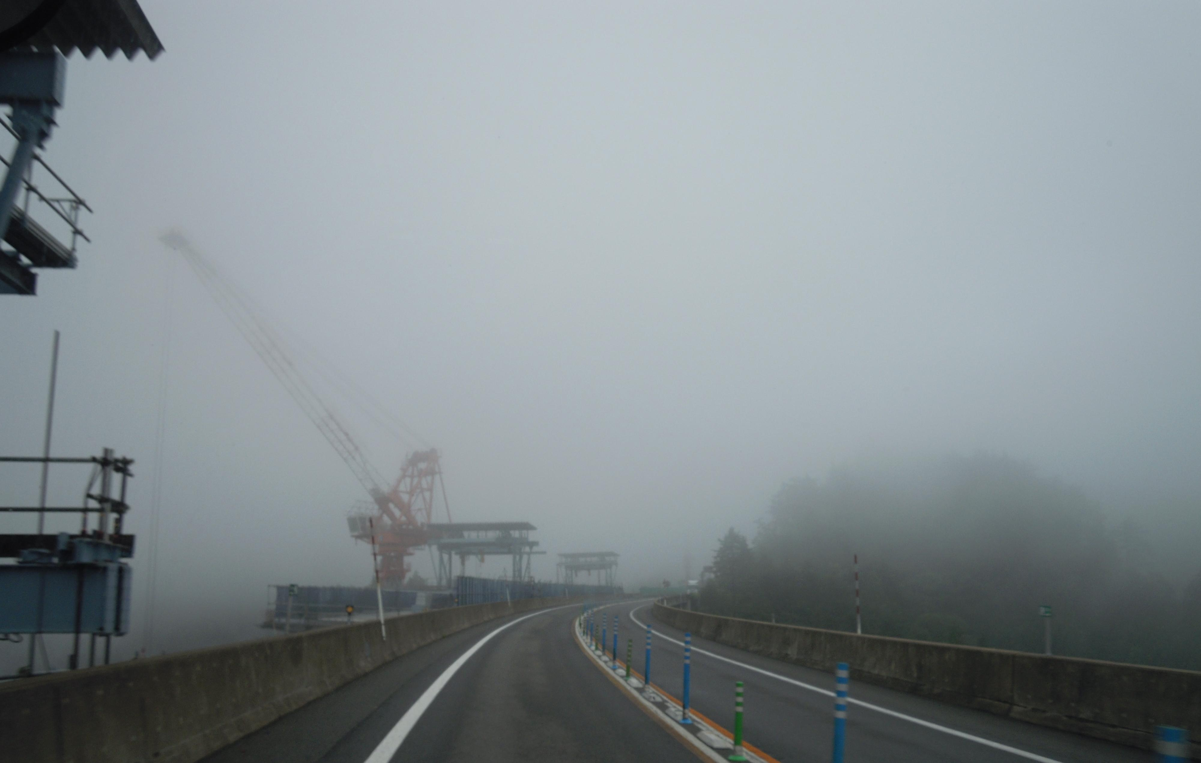 霧がかかったja:東海北陸自動車道のja:鷲見橋。